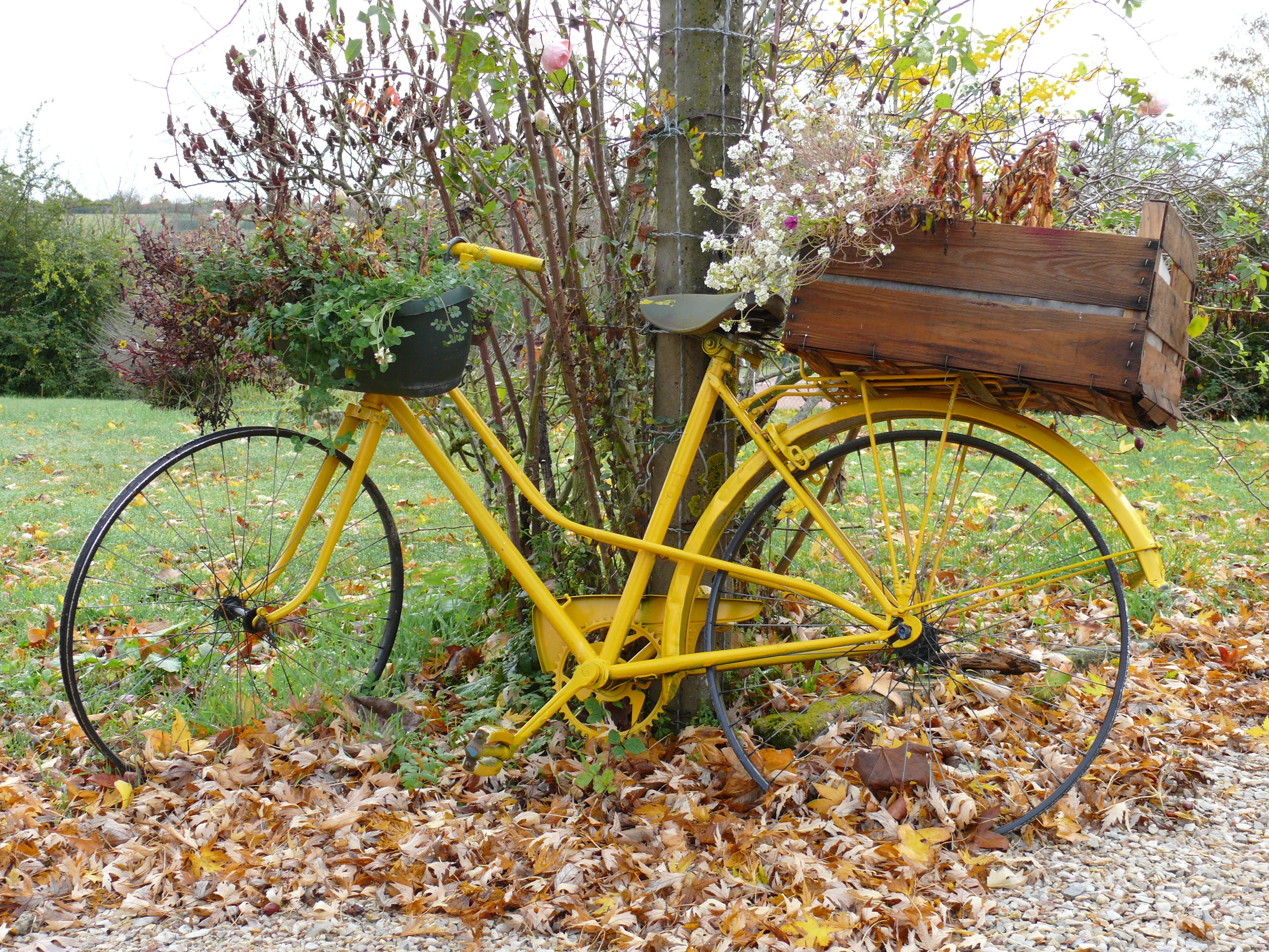 Autry-Issards - Vélo-décor